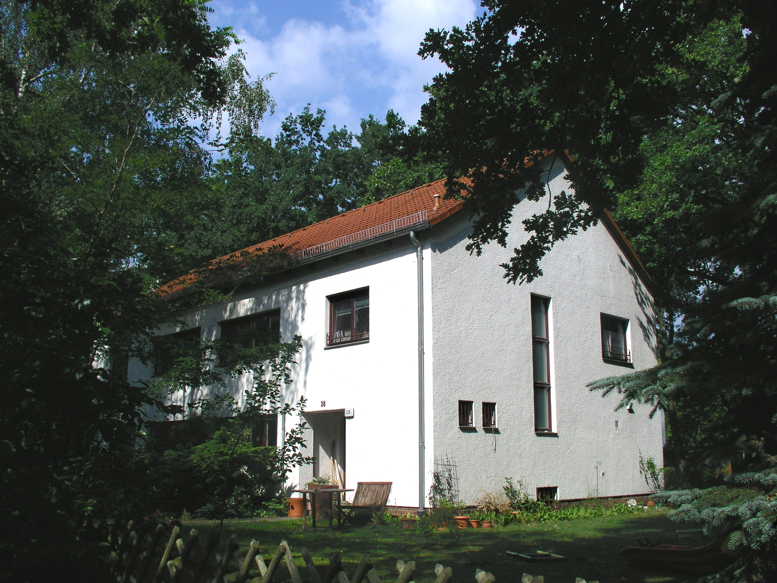 Mehrfamilienhäuser im Kiplingweg 28-30 vom Architekten Alfred Gellhorn